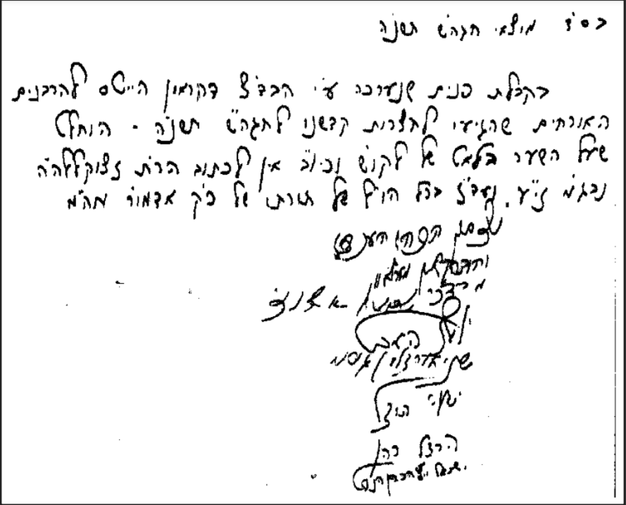 פסק שבועות תשנ"ה